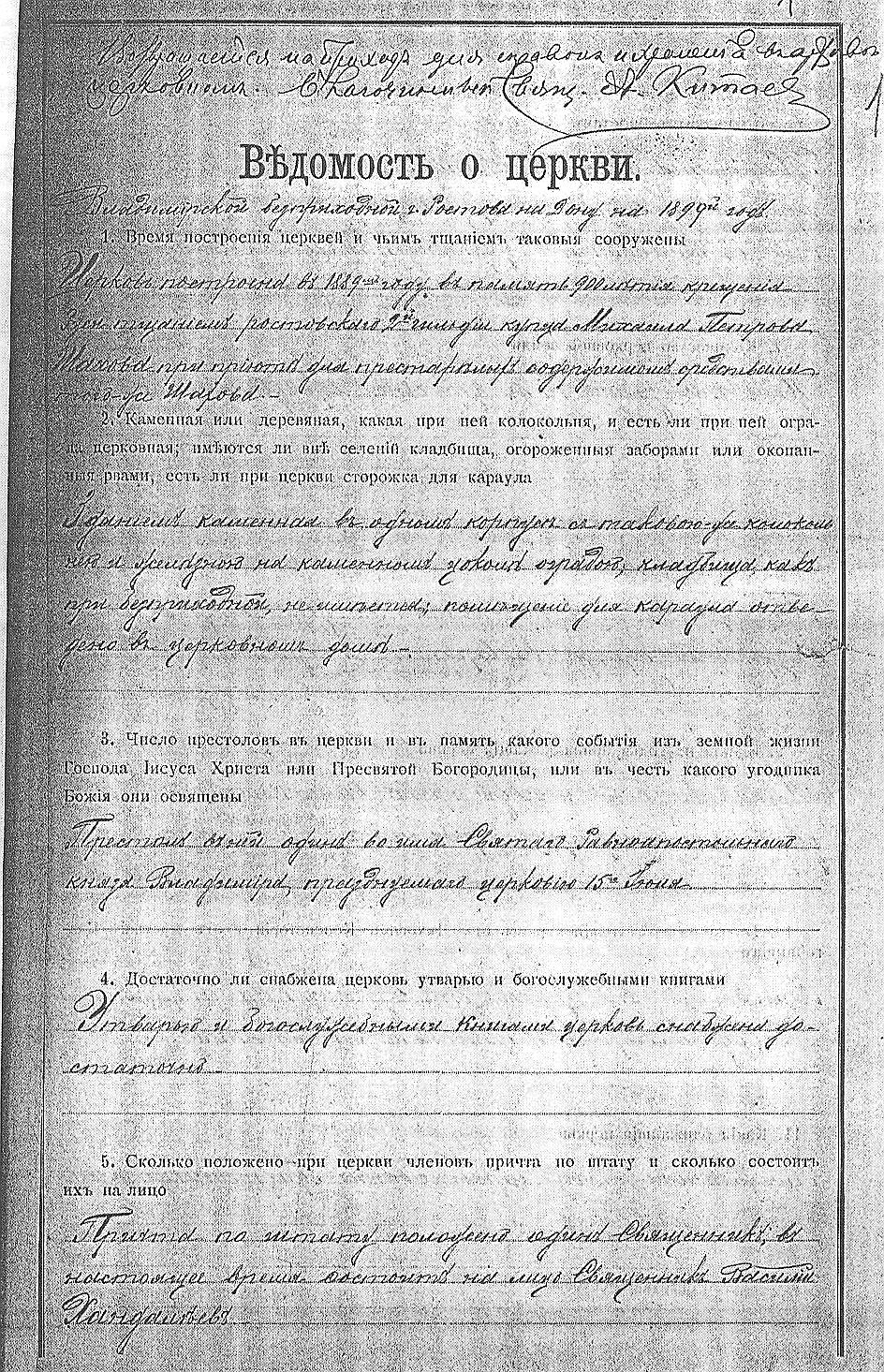 Храм Святого равноапостольного Князя Владимира в городе Ростов-на-Дону РФ